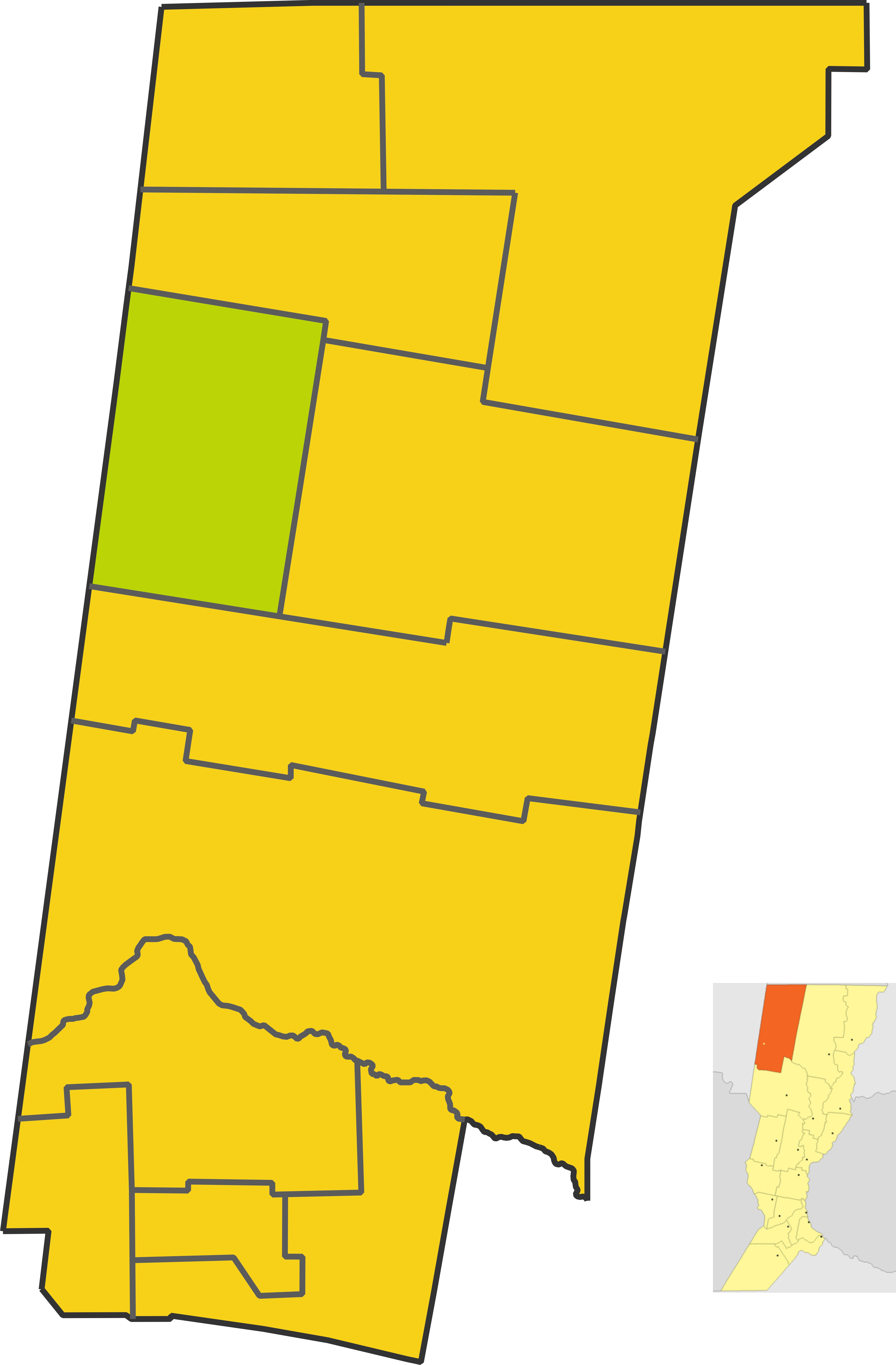 Map of the comuna de Villa Minetti in Nueve de Julio department, Santa Fe province, Argentina